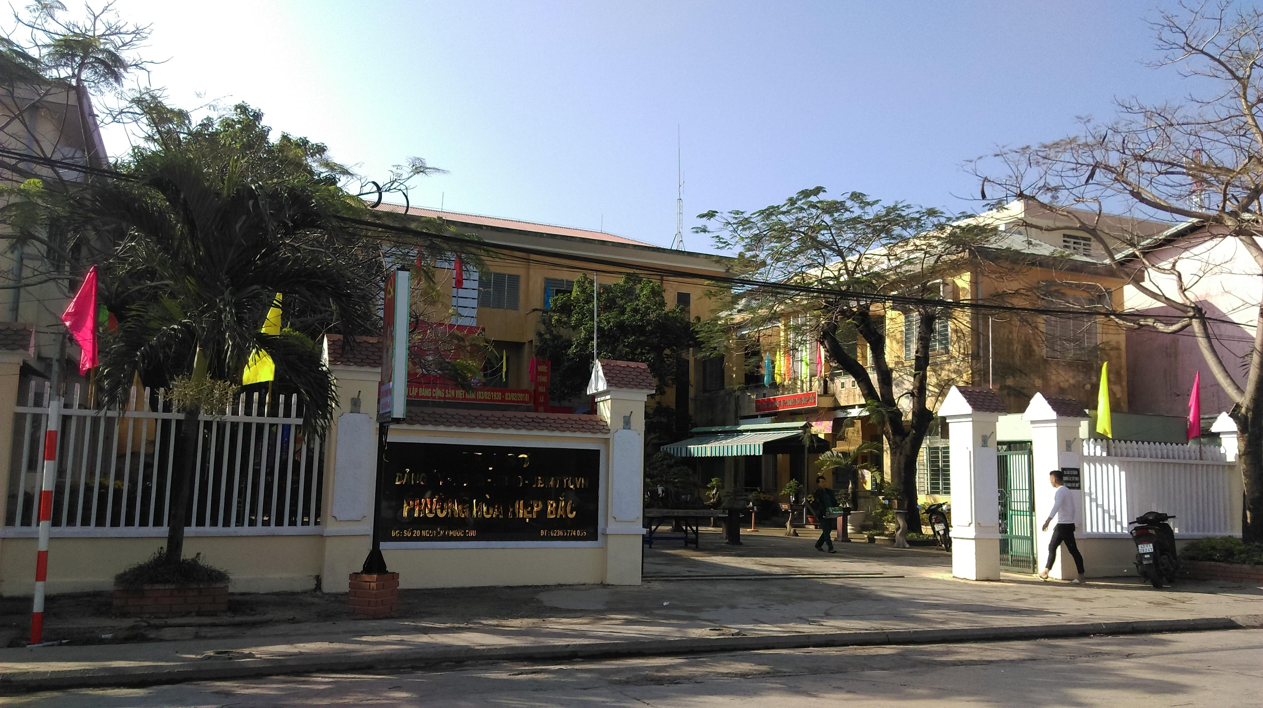 UBND phường Hòa Hiệp Bắc, Liên Chiểu, Đà Nẵng